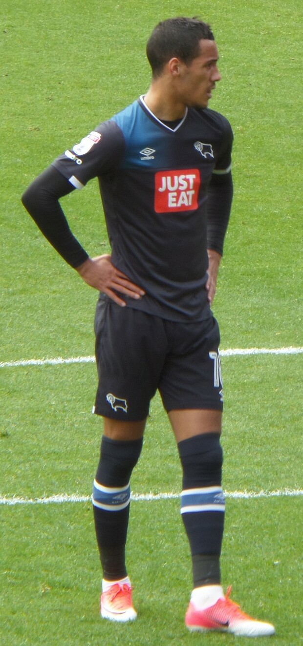 SAMSUNG CAMERA PICTURES